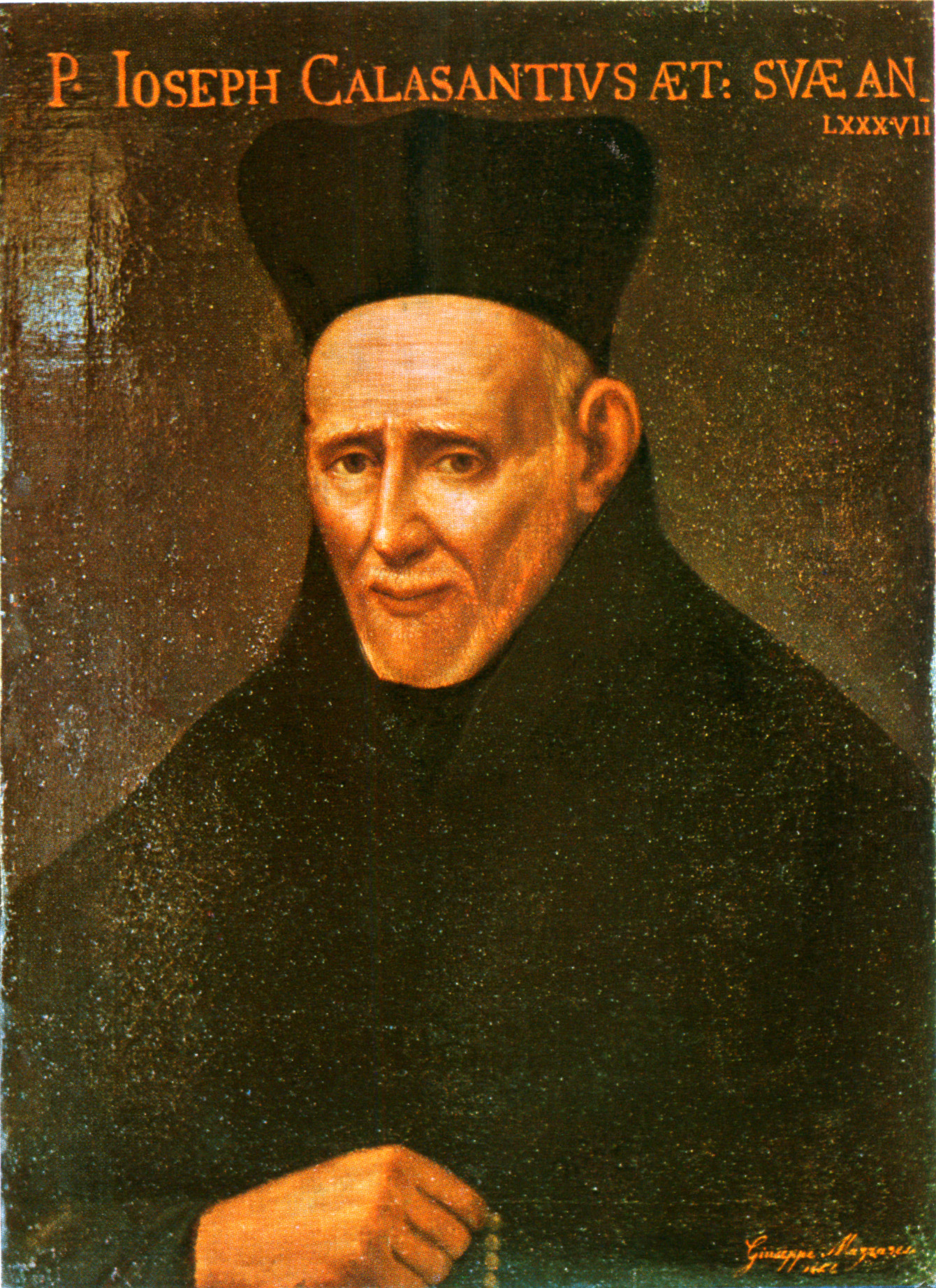 Kalazanci Szent József portréja a San Pantaleo rendházban, Rómában